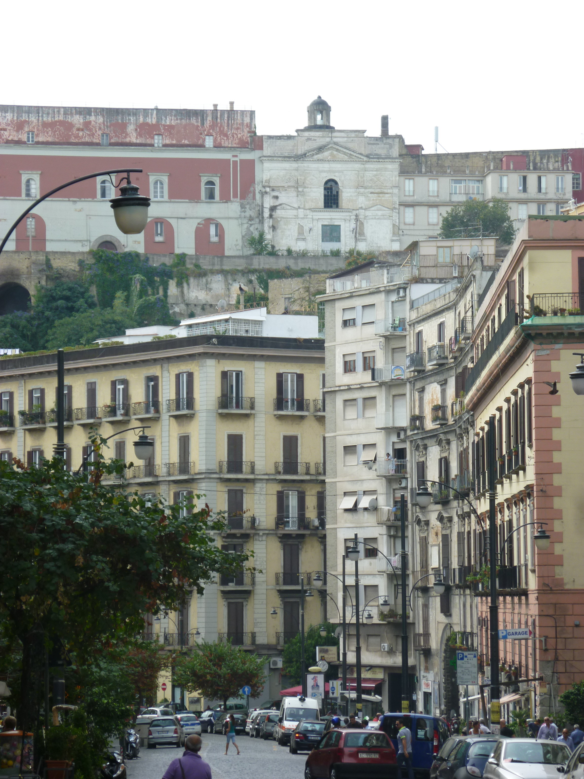 Napoli